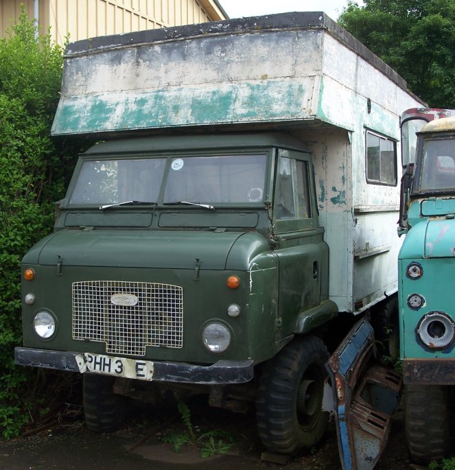 Land Rover Forward Control IIB LKW mit Wohnwagenaufbau in Rugby, GB